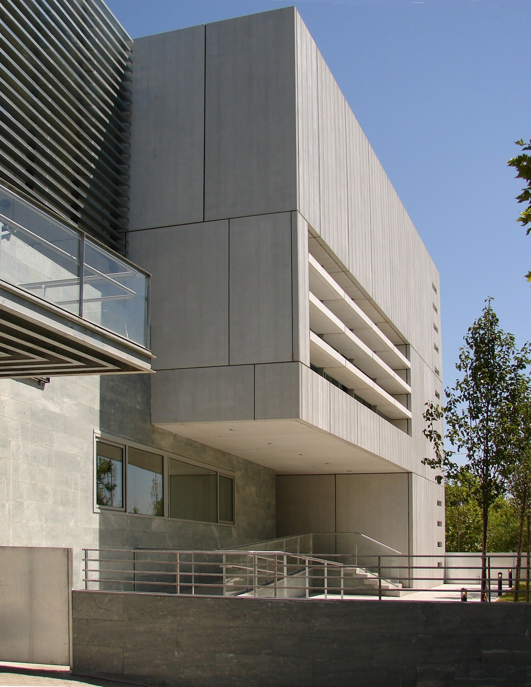 Biblioteca Municipal - Public Library - Lope de Vega (Tres Cantos) -Madrid